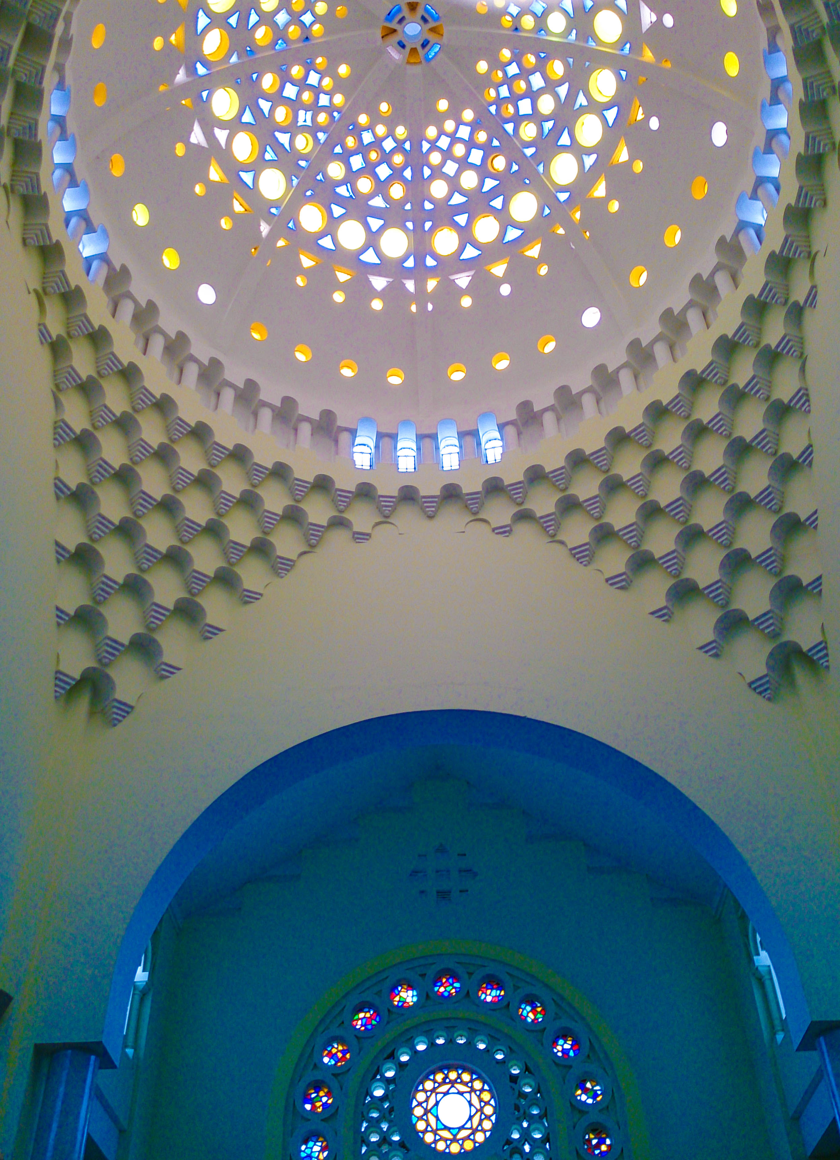 Nhà thờ Tông (Sơn Tây - Hà Nội)